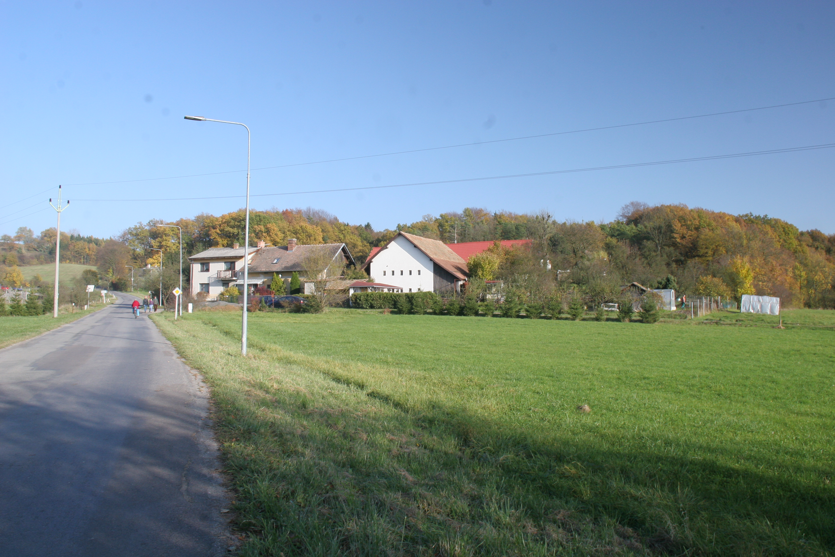 Kamenec čp. 19